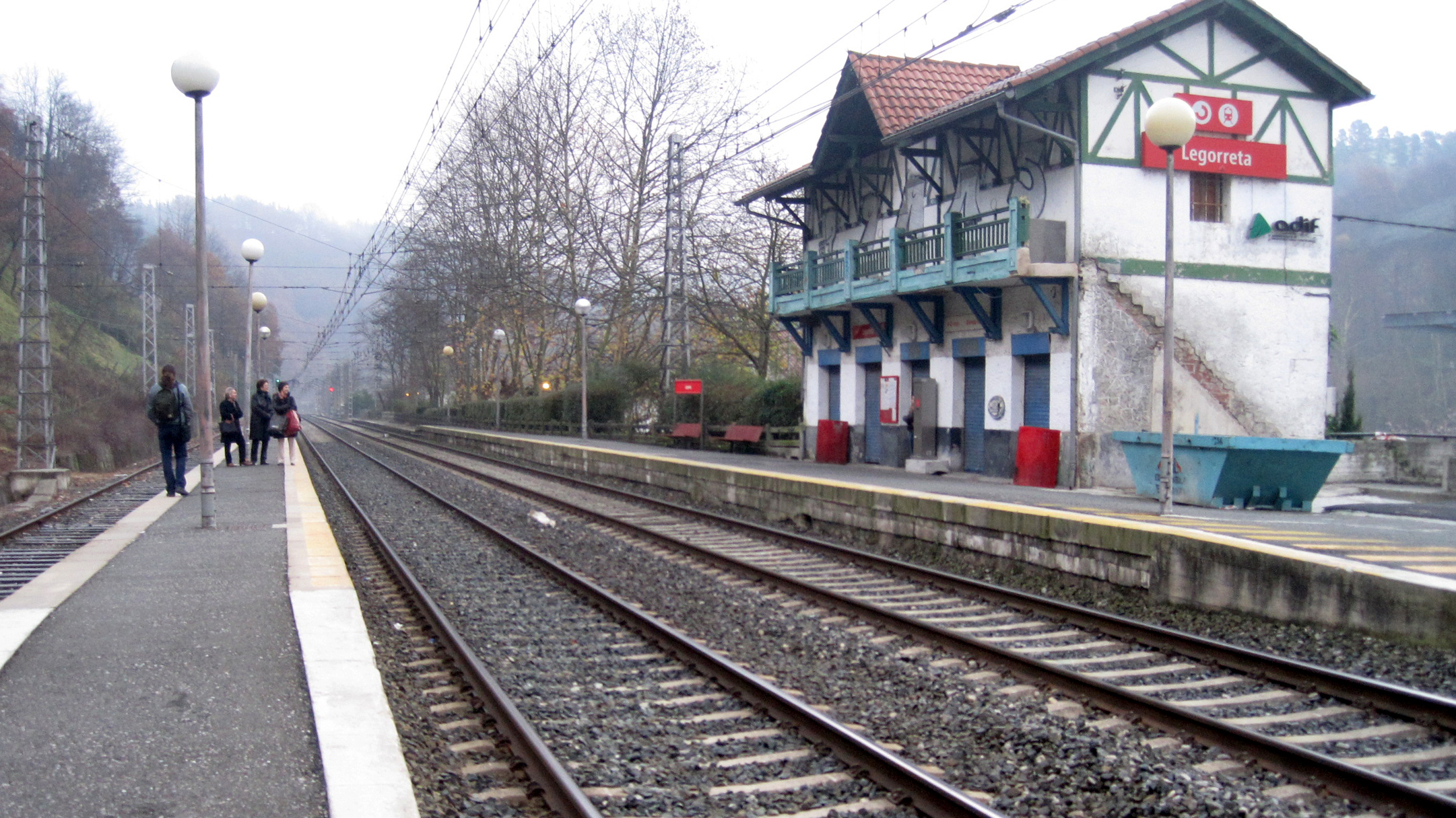 Vista de la estación